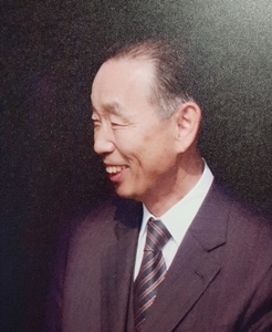 남포교회 박영선 목사